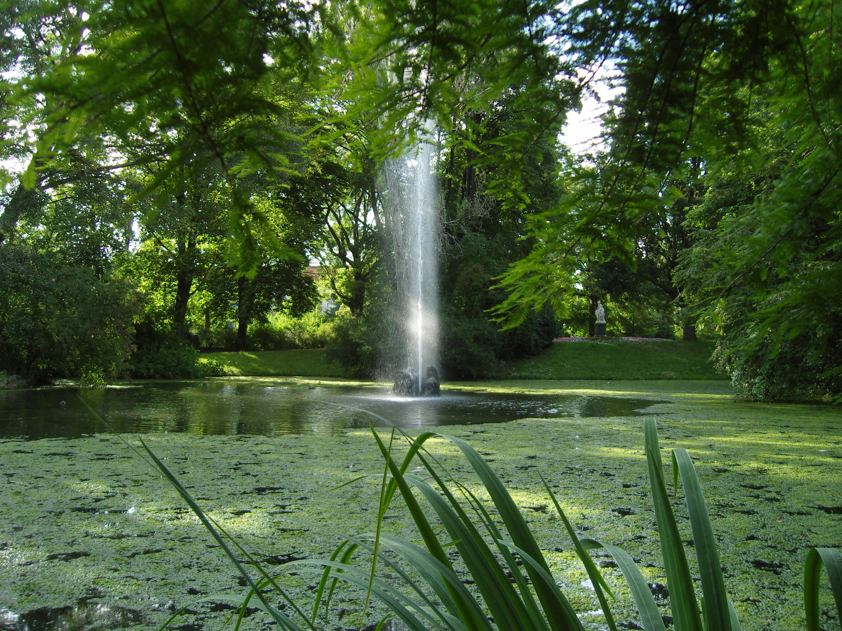 Teich in der Bürgerwiese mit Fontäne, Entstehungszeit 1861, Schöpfer Peter Joseph Lenné